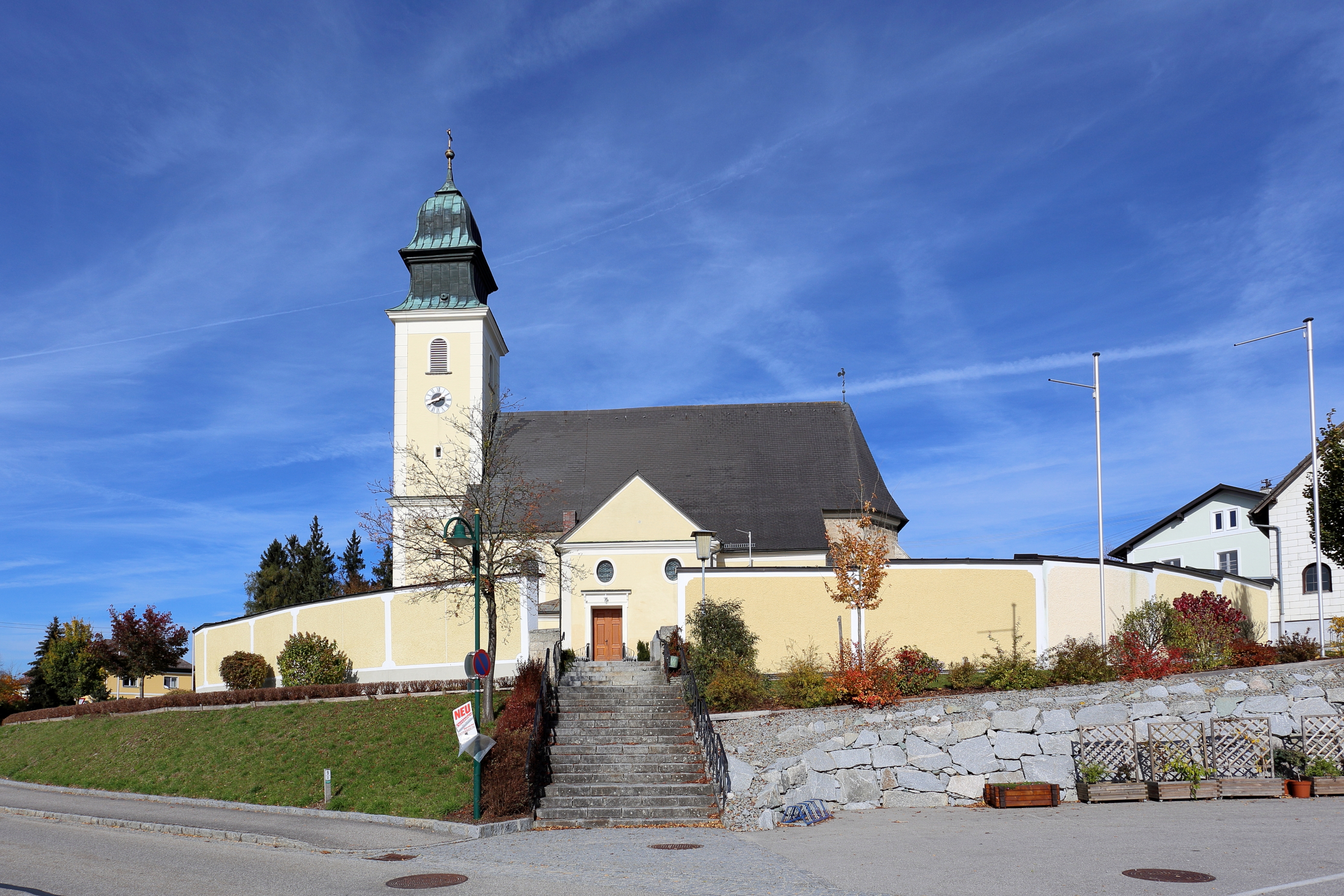 Südansicht der katholischen Pfarrkirche Mariä Himmelfahrt der oberösterreichischen Gemeinde Weilbach. Ein Tuffsteinbau dessen Langhaus spätbarock ist (1775). Ostseitig angebaut ist ein leicht eingezogener zweijochiger, gotischer Chor mit 5/8-Schluss. Der barocke Westturm mit einer hohen Haube wurde um 1780 errichtet.